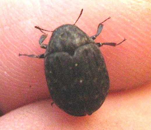 Der Pillenkäfer Byrrhus pilula, gefunden im Nauener Stadtwald (Brandenburg